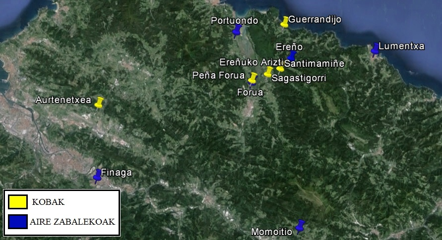 Erromatar Inperioaren bukaerako aztarnategiak Bizkaian